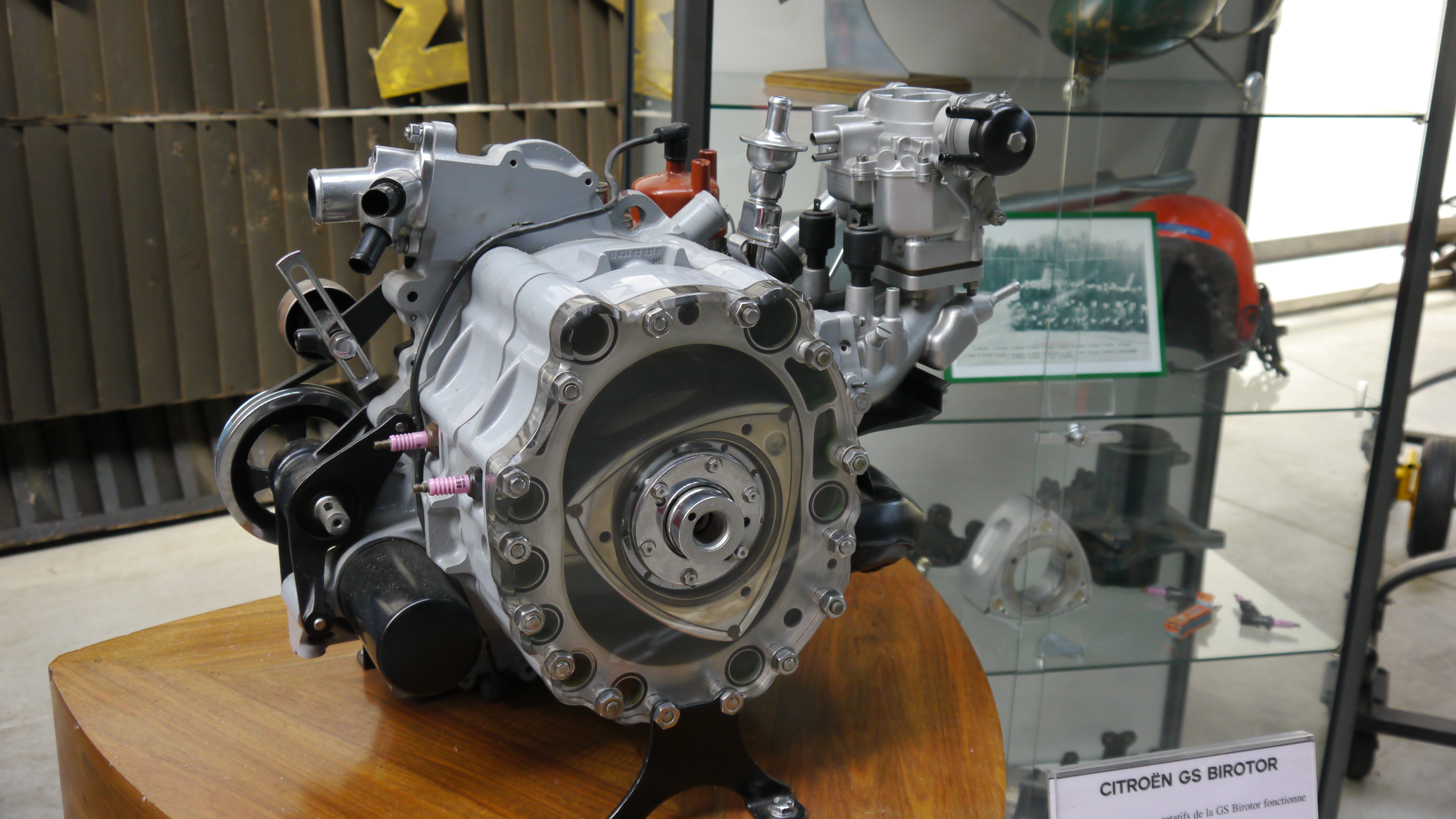 Conservatoire Citroen 210 Citroen Helikopter